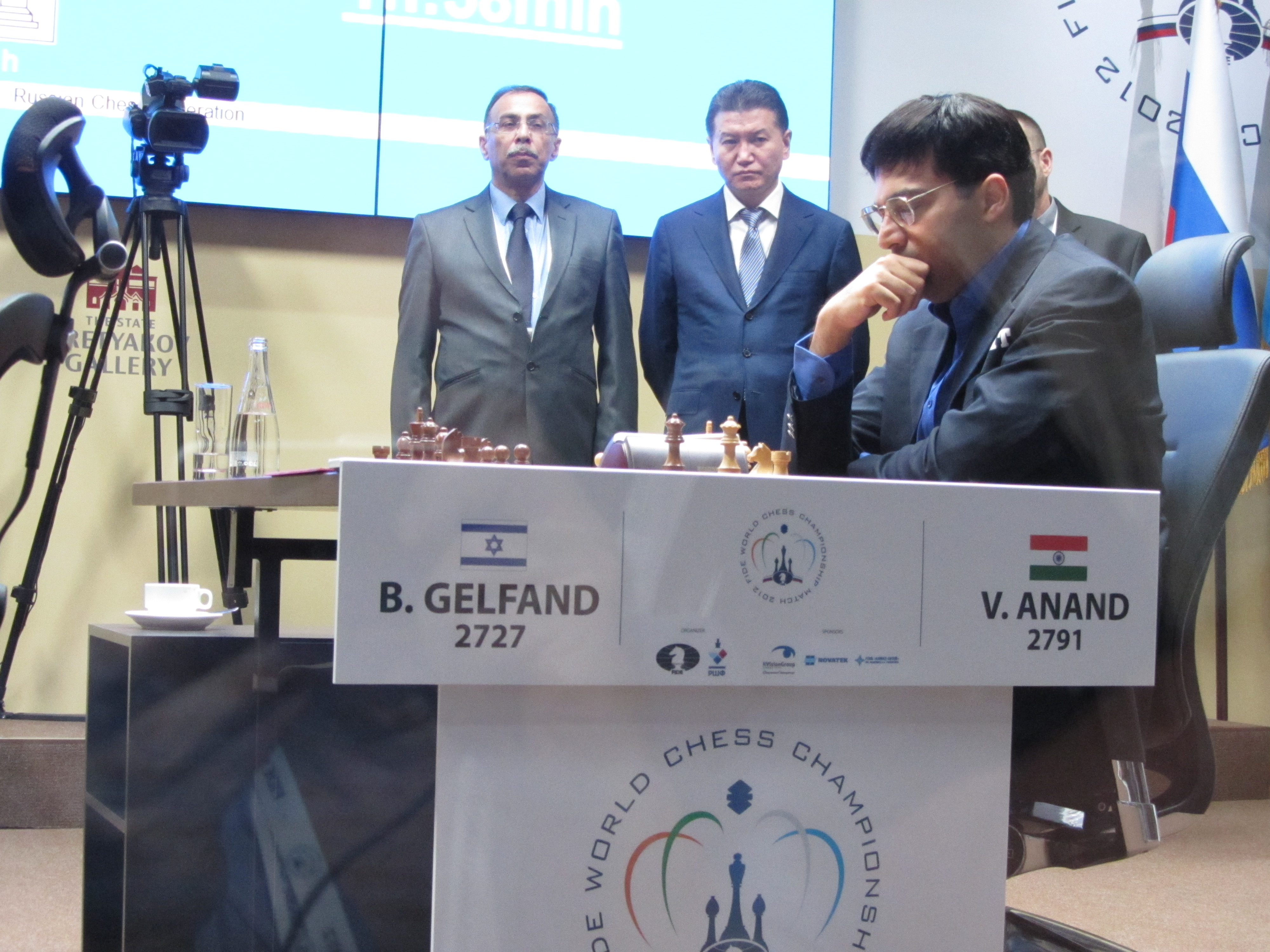 Vishy Anand espera la llegada de Borís Gélfand durante el Campeonato Mundial 2012. Al fondo, el árbitro Ashot Vardapetián y el presidente de la FIDE Kirsán Iliumzhínov